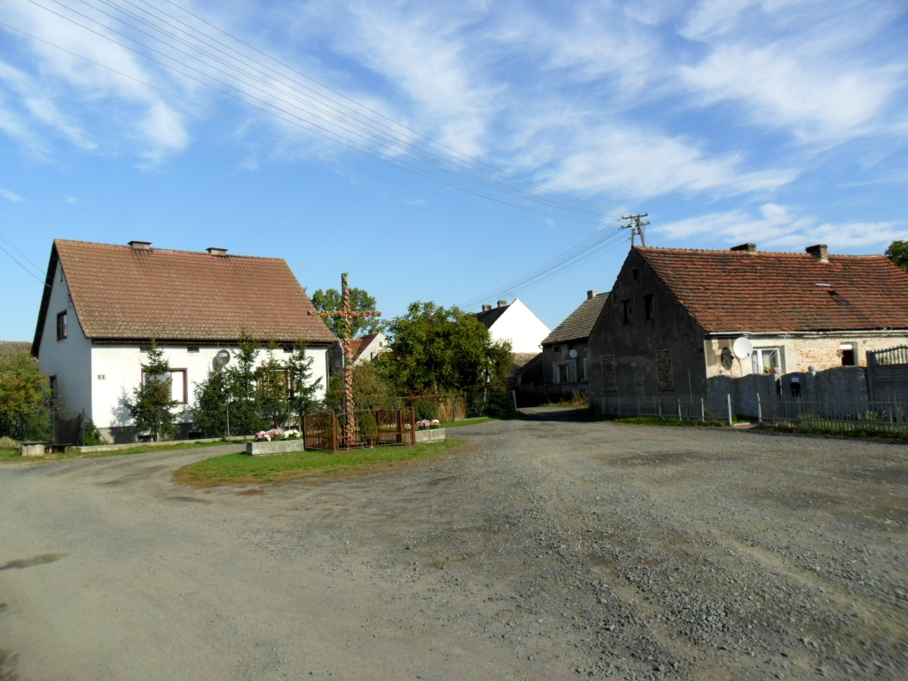 Gubinek